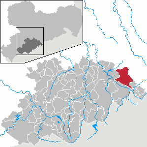 Pfaffroda im Erzgebirgskreis, Sachsen